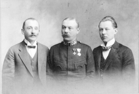 bratři Rudolf Praveček (vlevo), hudební skladatel Alois Praveček (uprostřed) a dirigent Jinřich Praveček (vpravo) v roce 1915